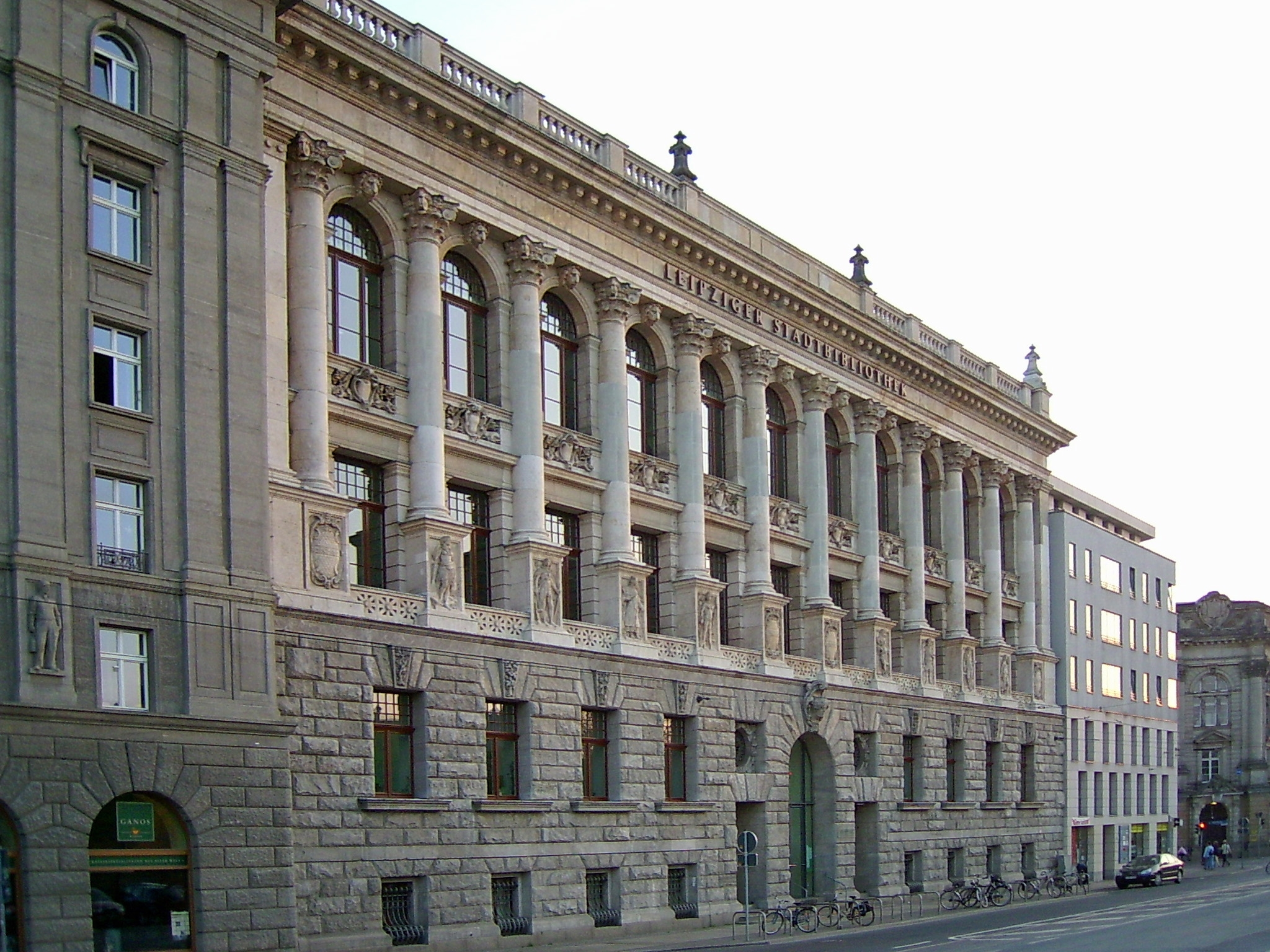 Gebäude des alten Grassimuseums, heute Sitz der Leipziger Stadtbibliothek